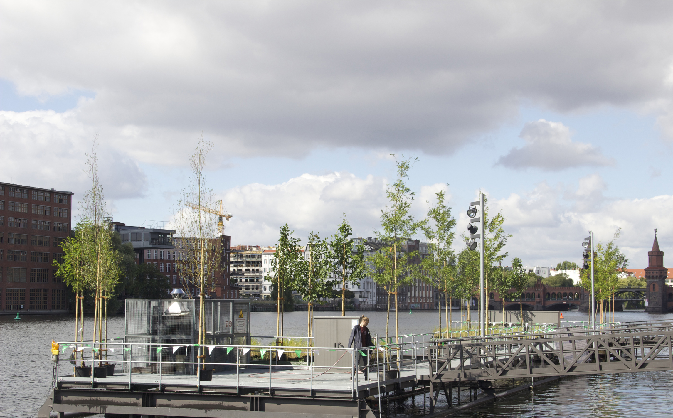 Blick auf die Anlage Spree2011 mit 2015 neu angelegten Pflanzbereichen